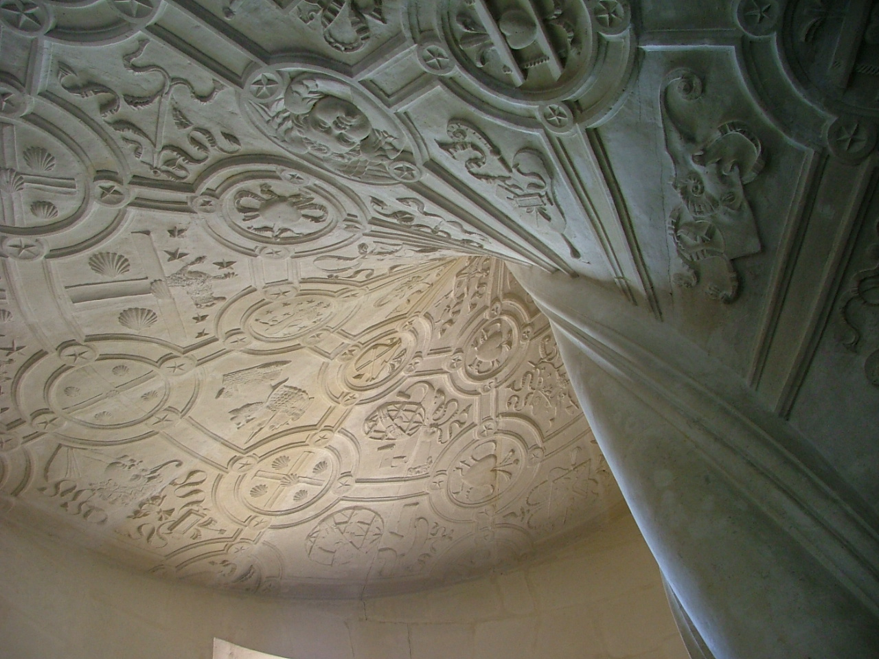 Bel exemple du décor renaissance en Vendée